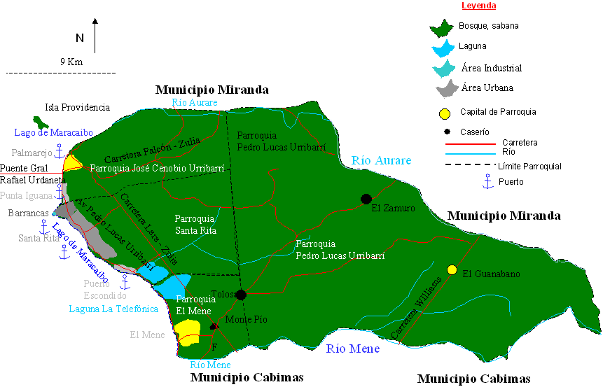 Mapa del municipio Santa Rita, Estado Zulia, Venezuela